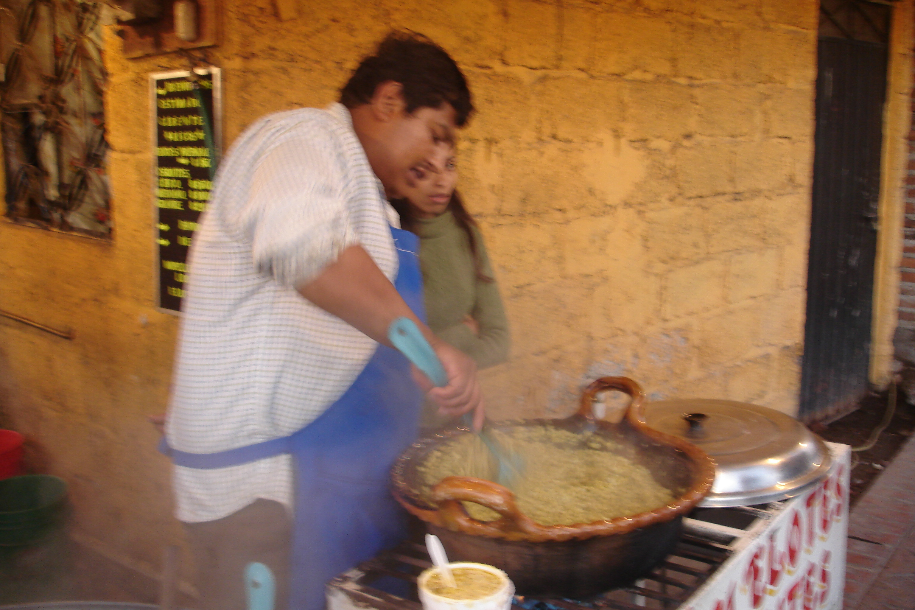 Señor preparando esquites fritos en una cazuela de barro